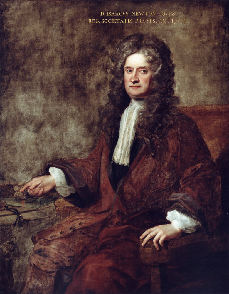 Portrait of Isaac Newton (1717) - Charles Jervas